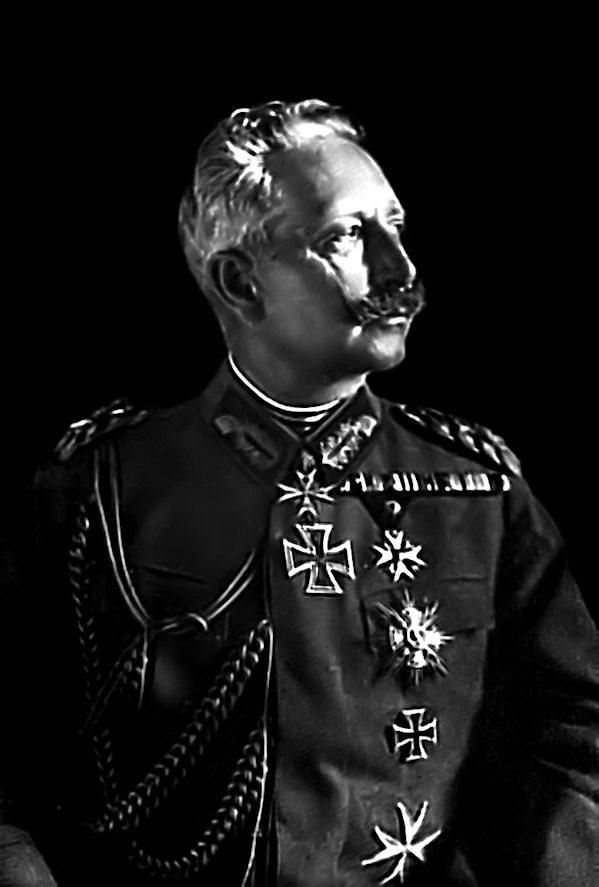 Fritz Wetterhoff